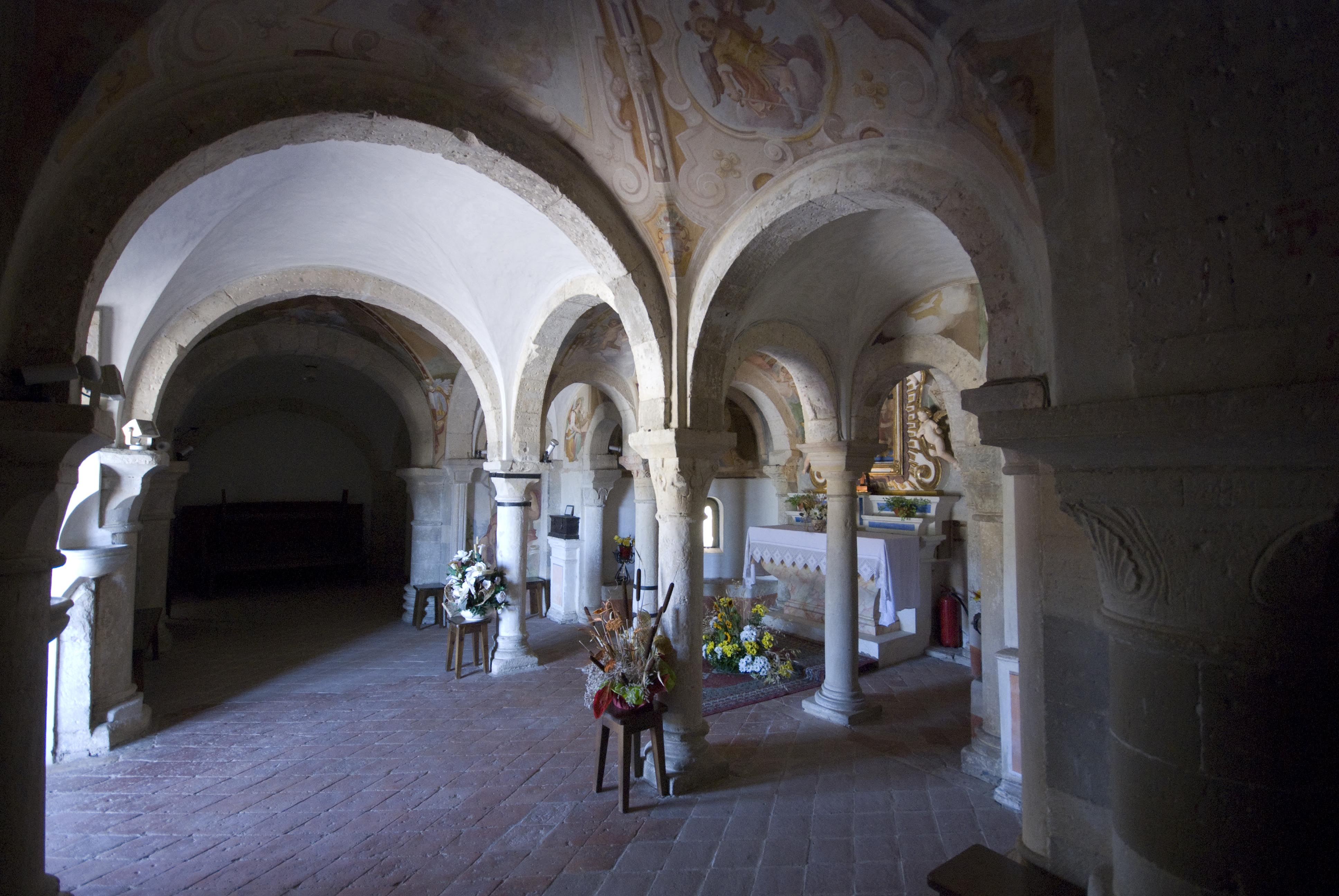 interno della chiesa di san niccolò a Casole d'Elsa